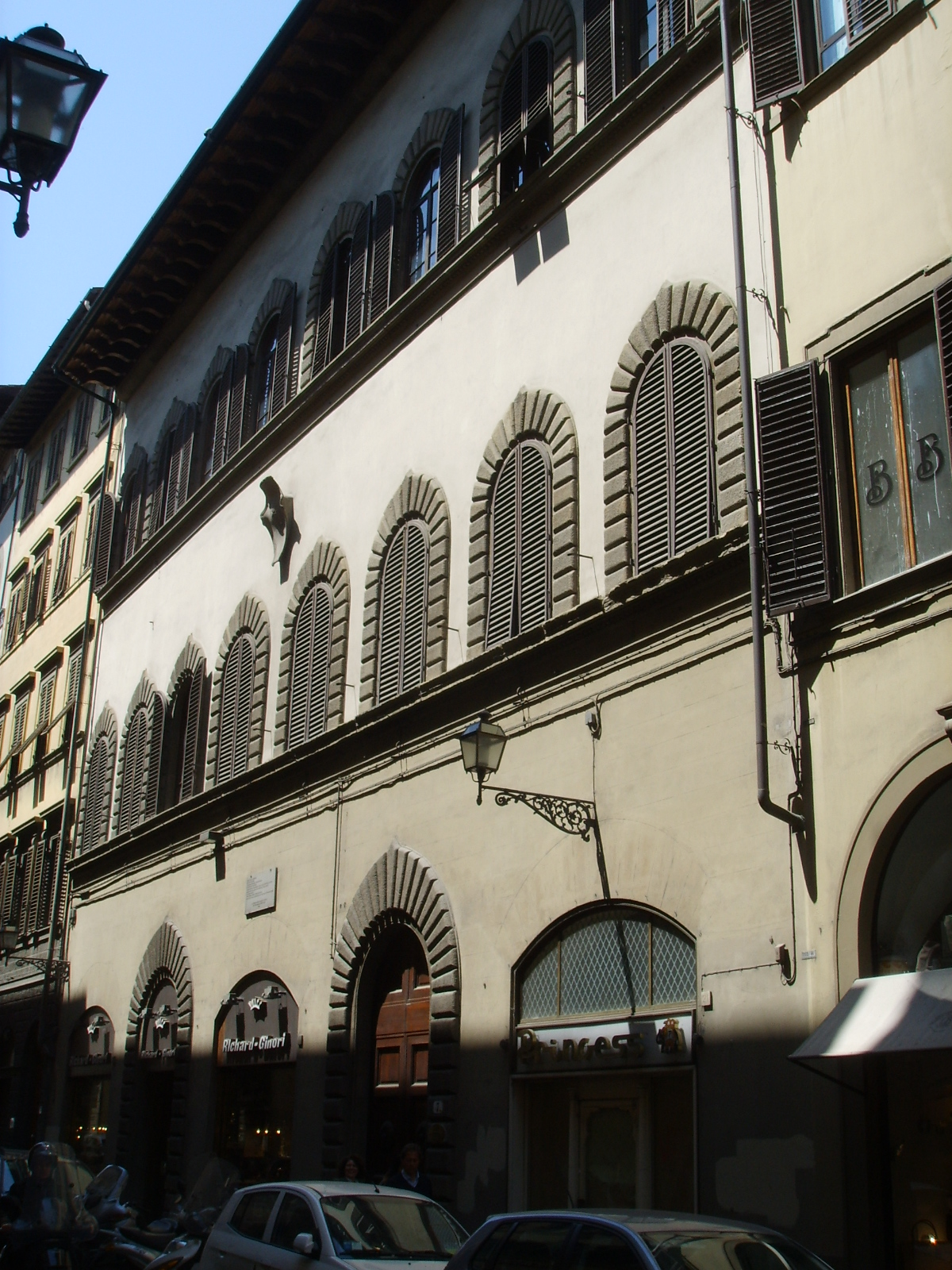 Palazzo ginori (via dei Rondinelli)